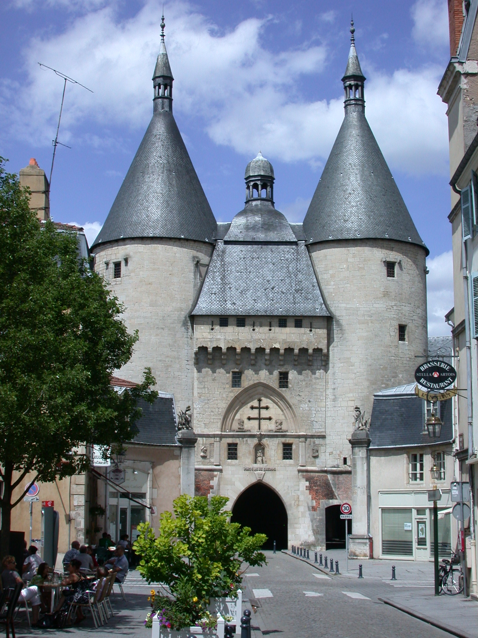 La Porte de la Craffa à Nancy